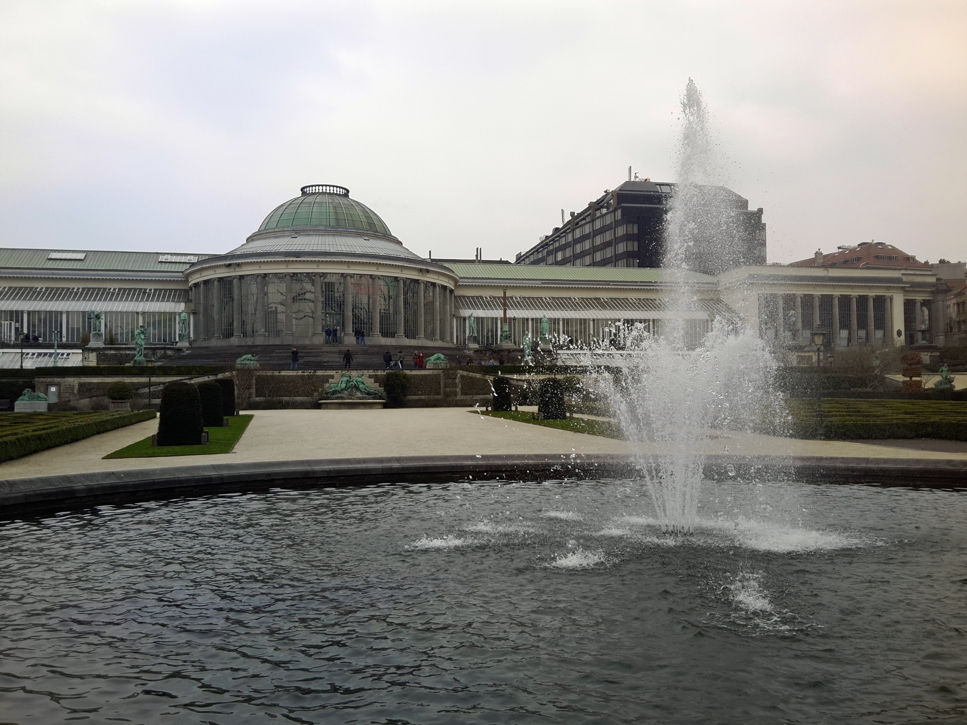 Ботанический сад